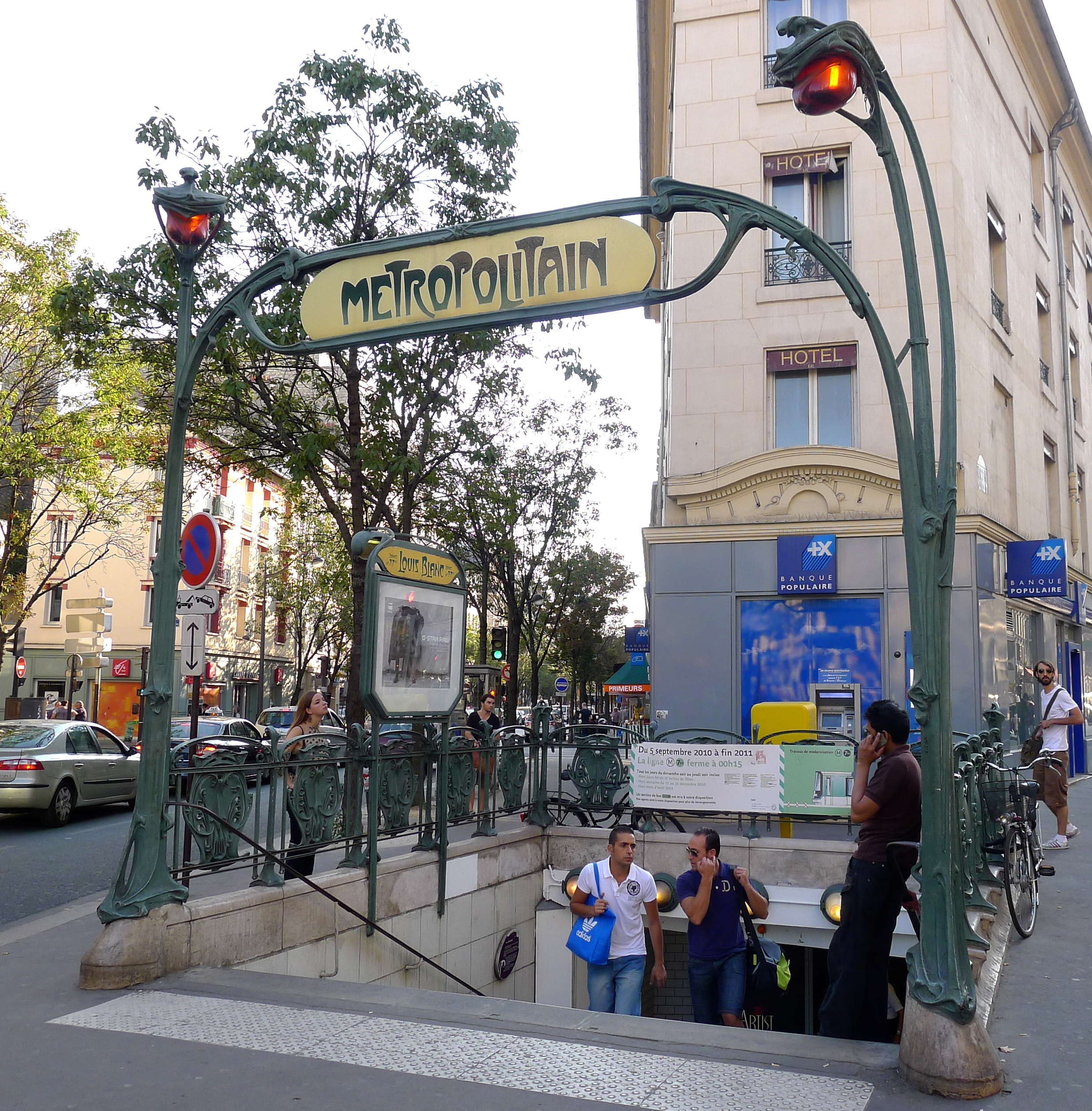 Édicule Guimard de la station Louis Blanc, 221 rue La Fayette, 223 rue du Faubourg-Saint-Martin, 75010 Paris (monument historique)